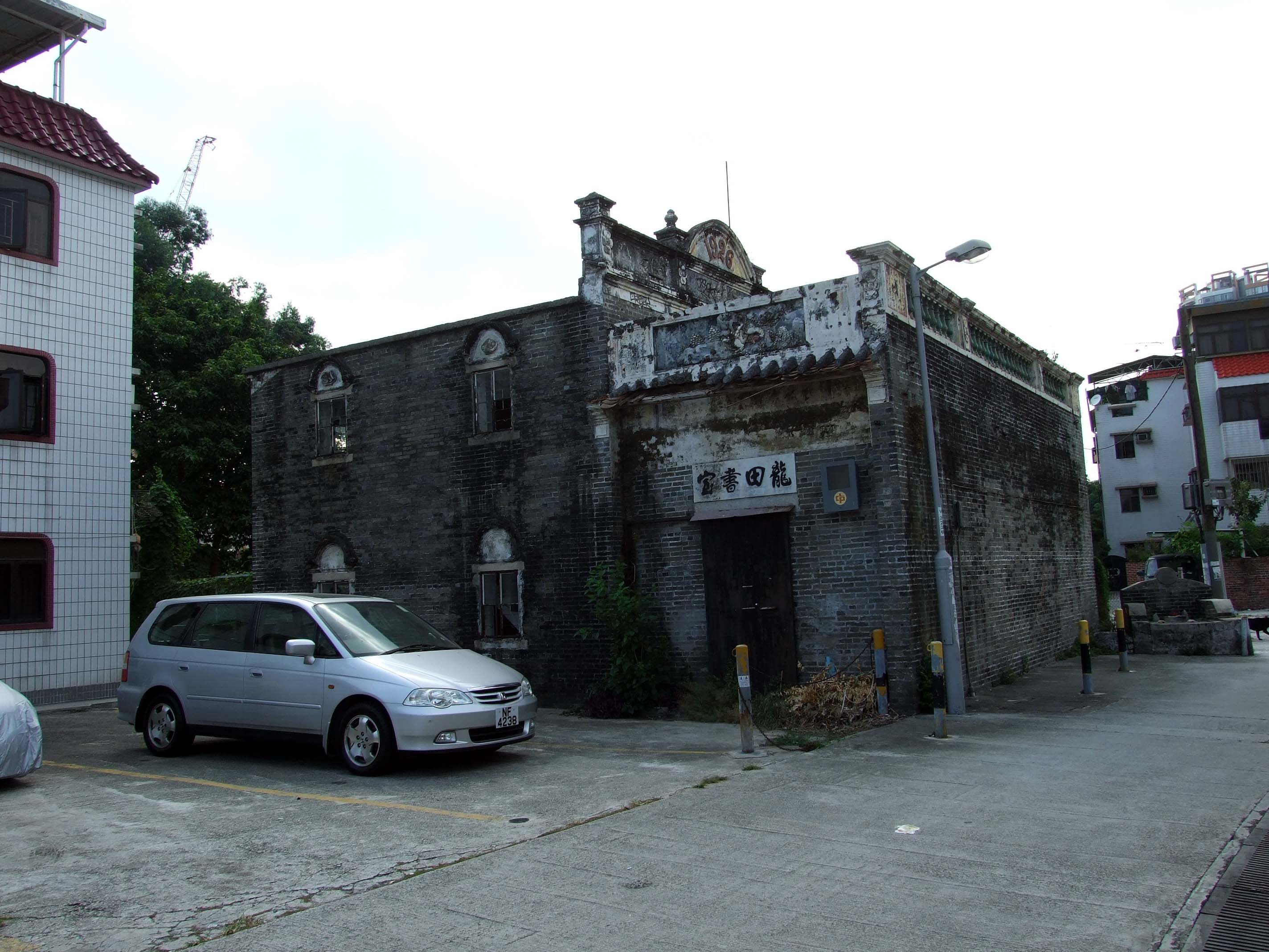 中文（香港）: 十八鄉龍田村龍田書室